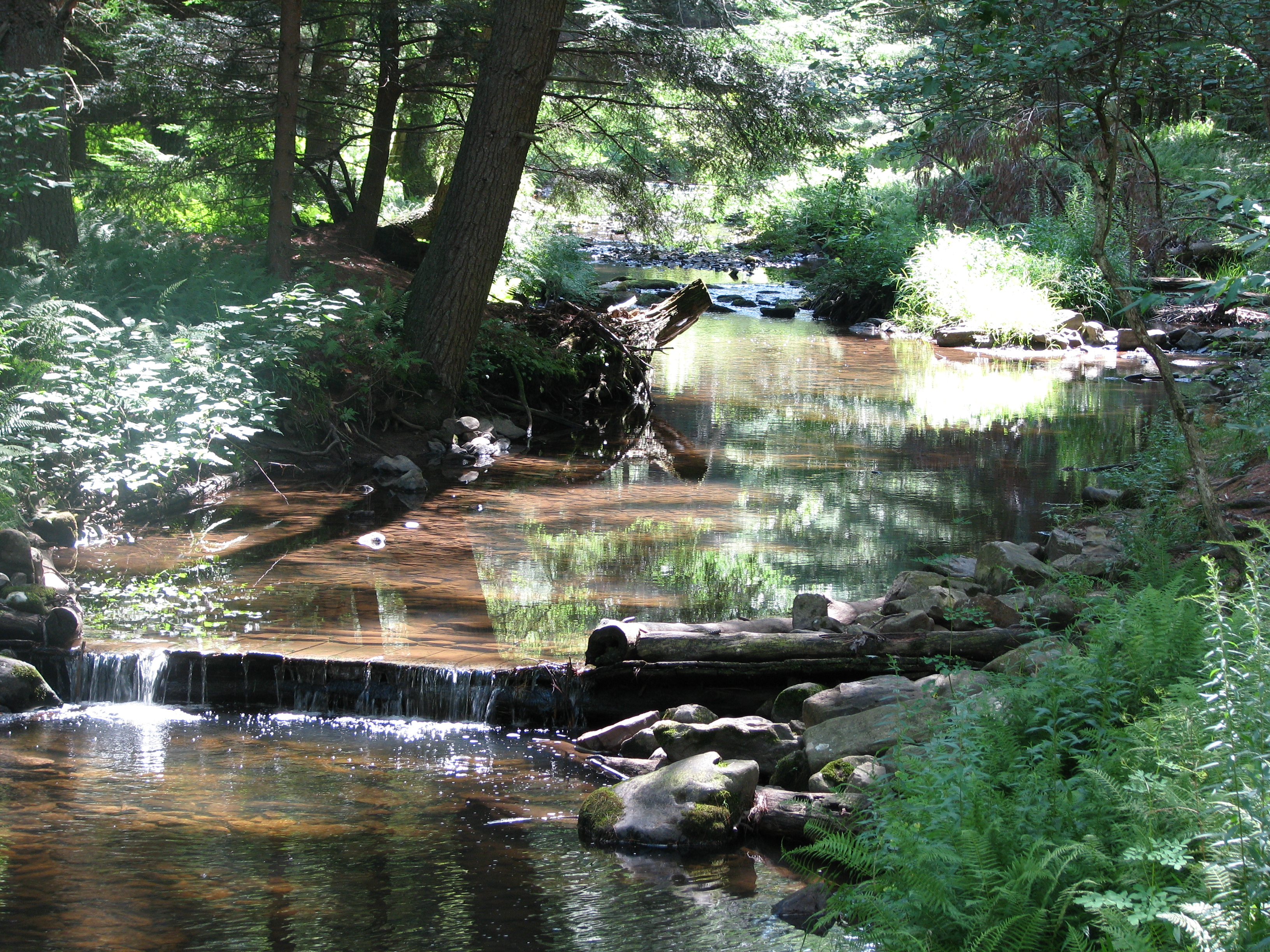 McCalls Dam State Park, White Deer Creek